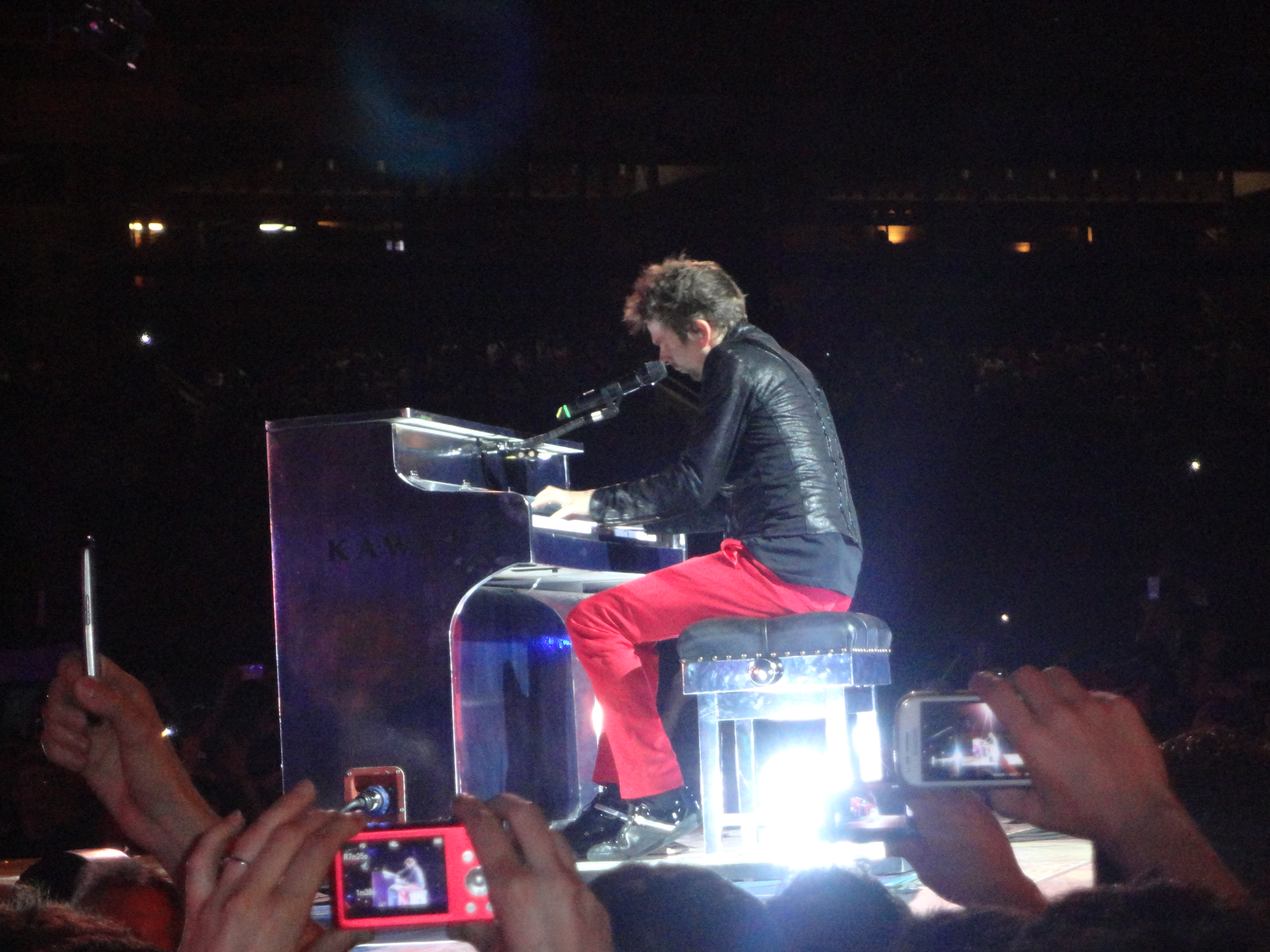 Matt Bellamy, cantant de Muse, al piano